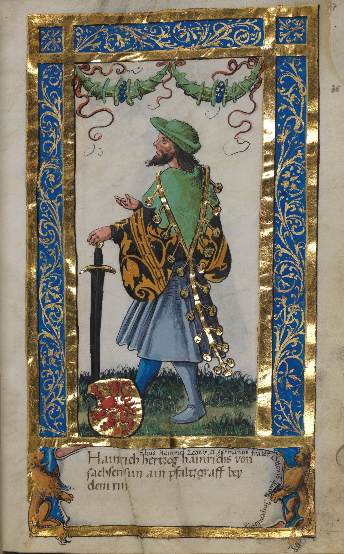 Weingartener Stifterbüchlein, Württembergische Landesbibliothek Stuttgart, Cod.hist.qt.584, fol. 36r, Stifterbild Heinrich, Pfalzgraf bei Rhein, Sohn Heinrichs des Löwen Hainrich hertzog hainrichs von sachsen sun ain pfaltzgraff bey dem rin kleiner: filius Hainrici Leonis et germanus frater Ottonis quatri Imperatoris